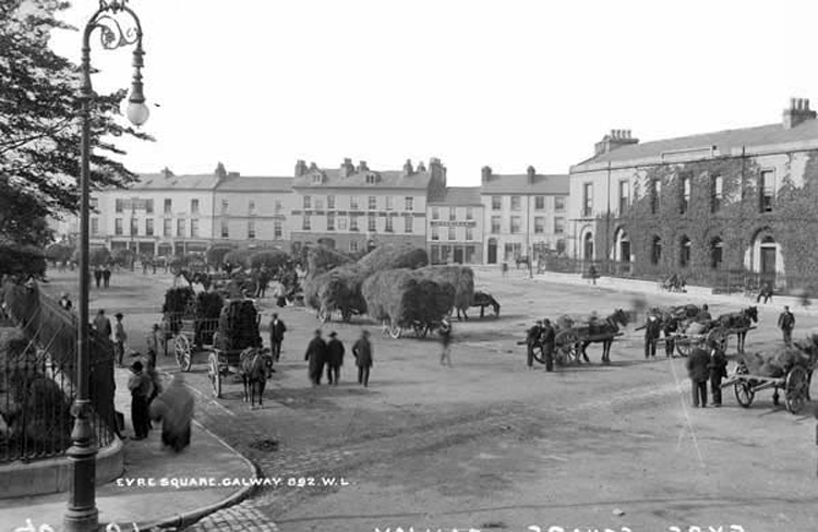 Date: Circa 1897 NLI Ref.: L_CAB_00892